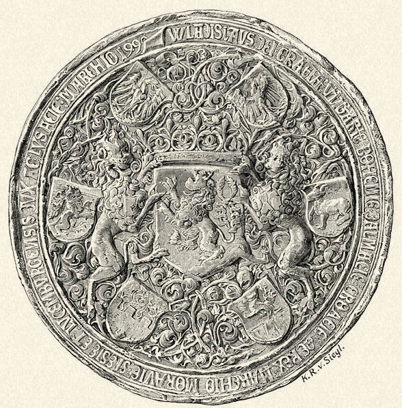 Pečeť Vladislava Jagellonského